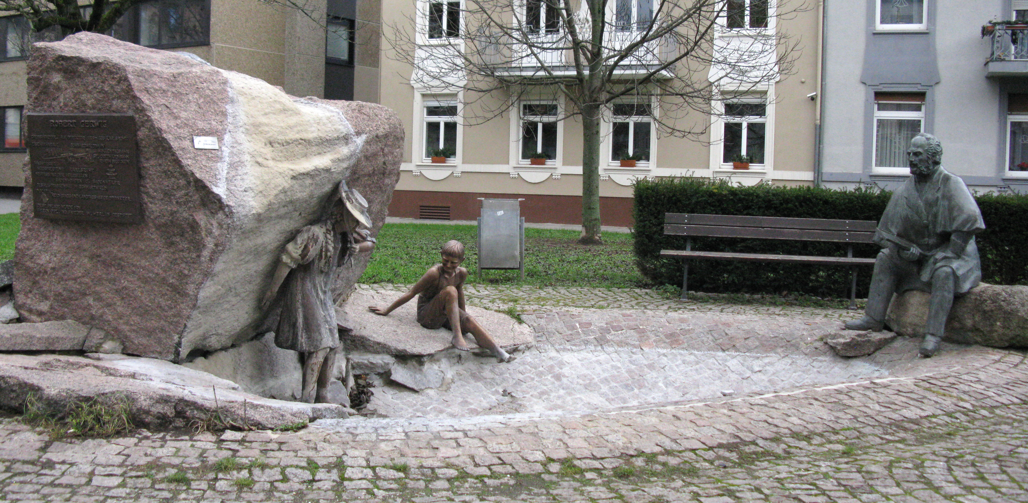 Gerwigbrunnen in der Karlsruher Gerwigstraße, 1987 von Walter Gerteis erschaffen